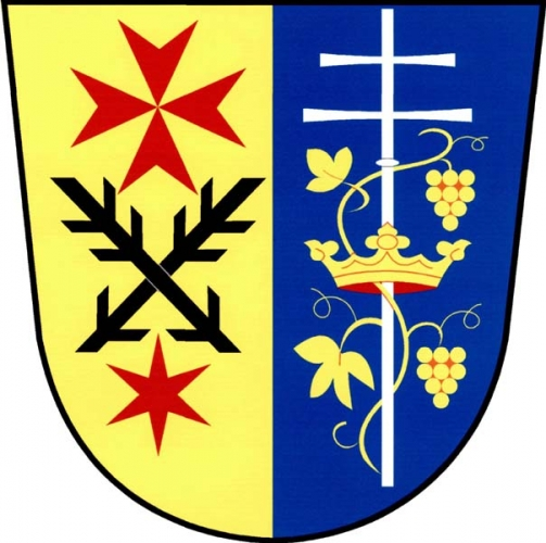 znak, Rybníky, okres Znojmo